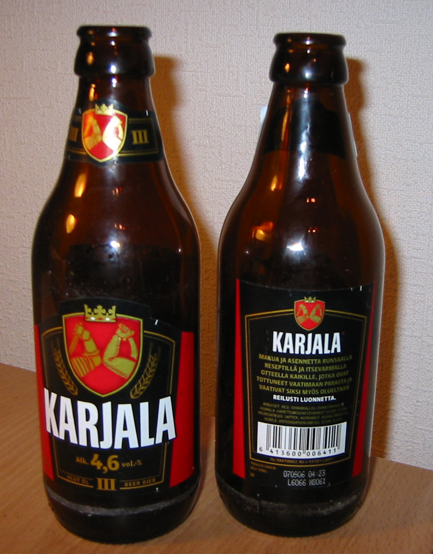 Karjala III beer